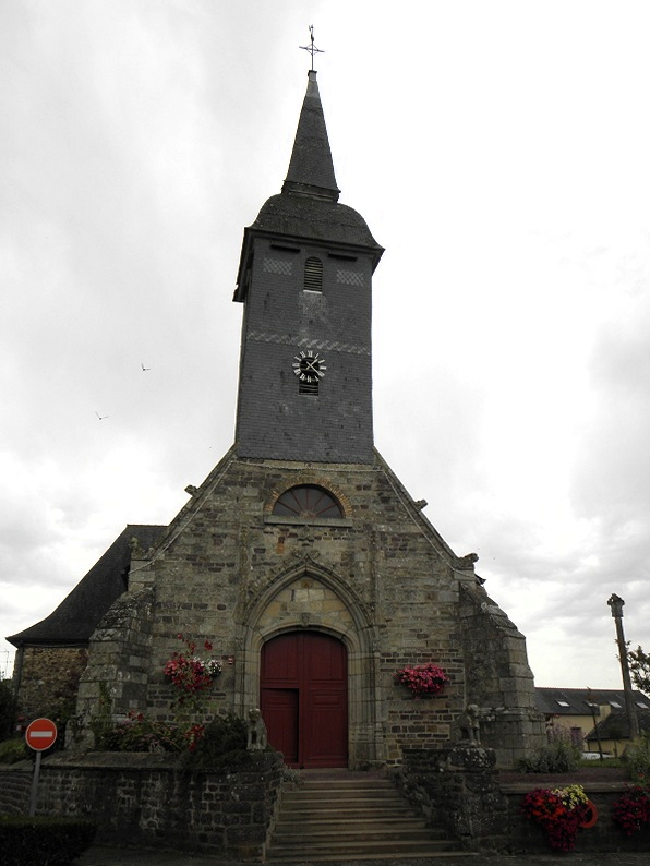 Façade occidentale de l'église Saint-Pierre de Pleumeleuc (35).